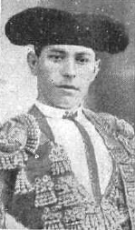 Fotografía del torero español Alfonso Cela «Celita» publicada en 1914 con motivo de haber lidiado con éxito a seis toros en Barcelona